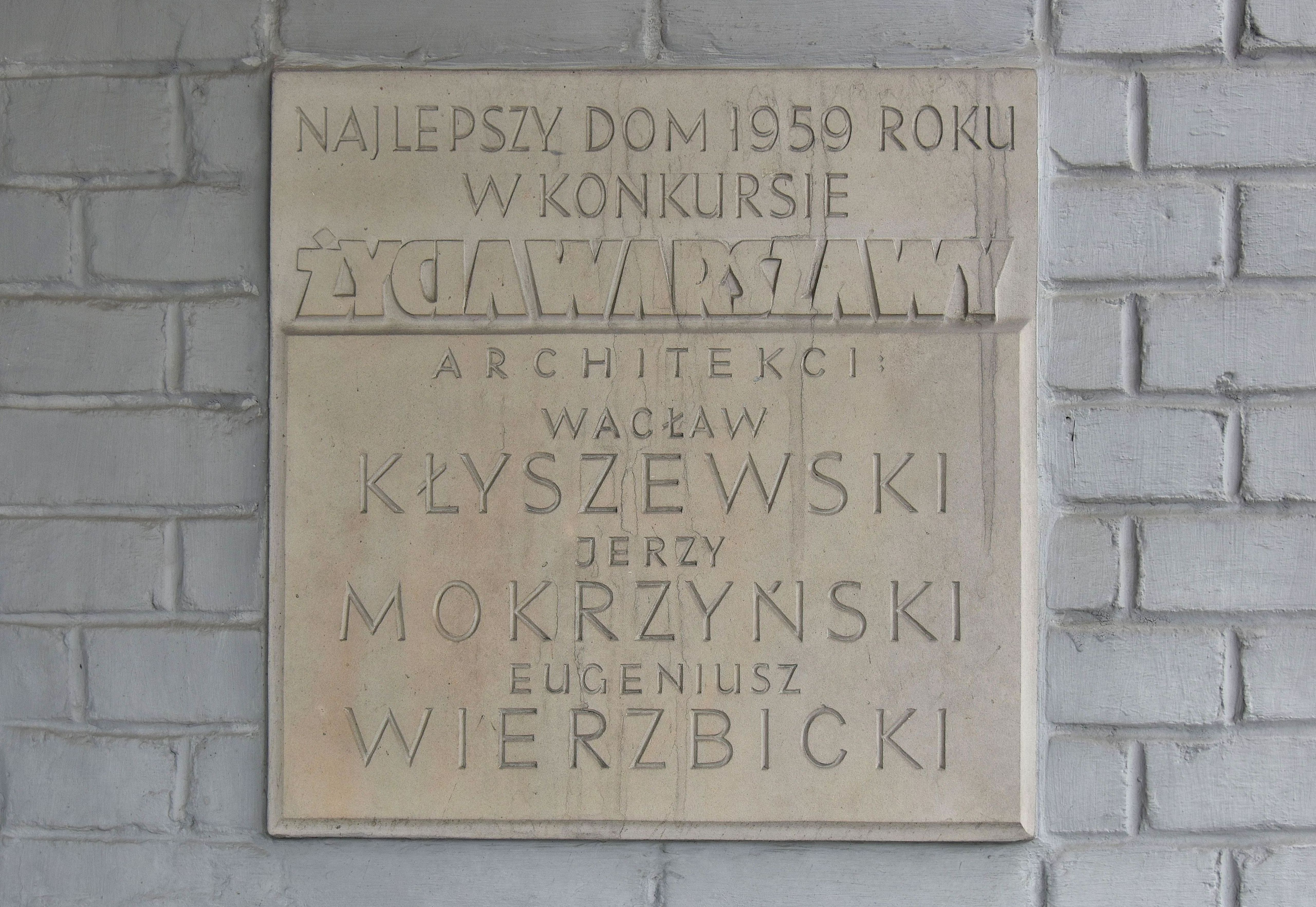 Tablica upamiętniająca pierwszego Mistera Warszawy, blok mieszkalny przy ul. Kredytowej 8, przy wejściu do budynku